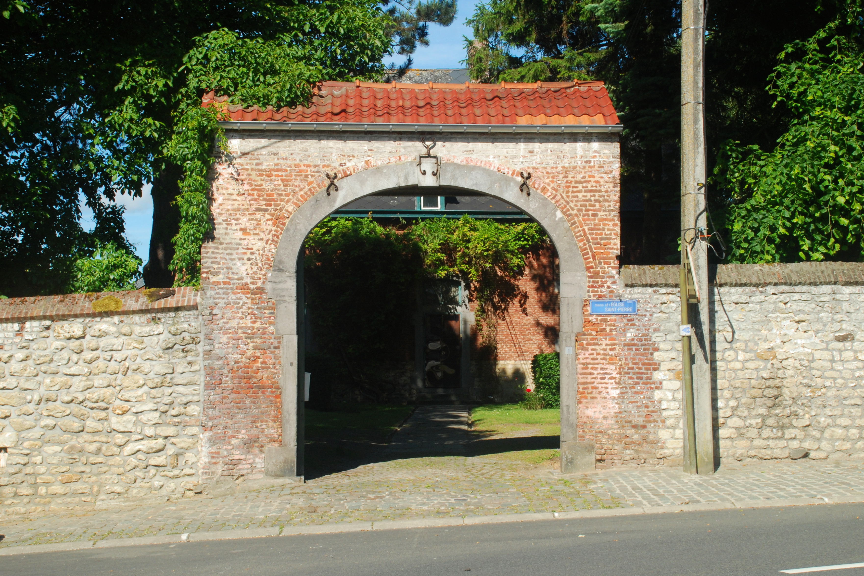 Belgique - Brabant wallon - Genappe - Glabais - Cure de l'église Saint-Pierre